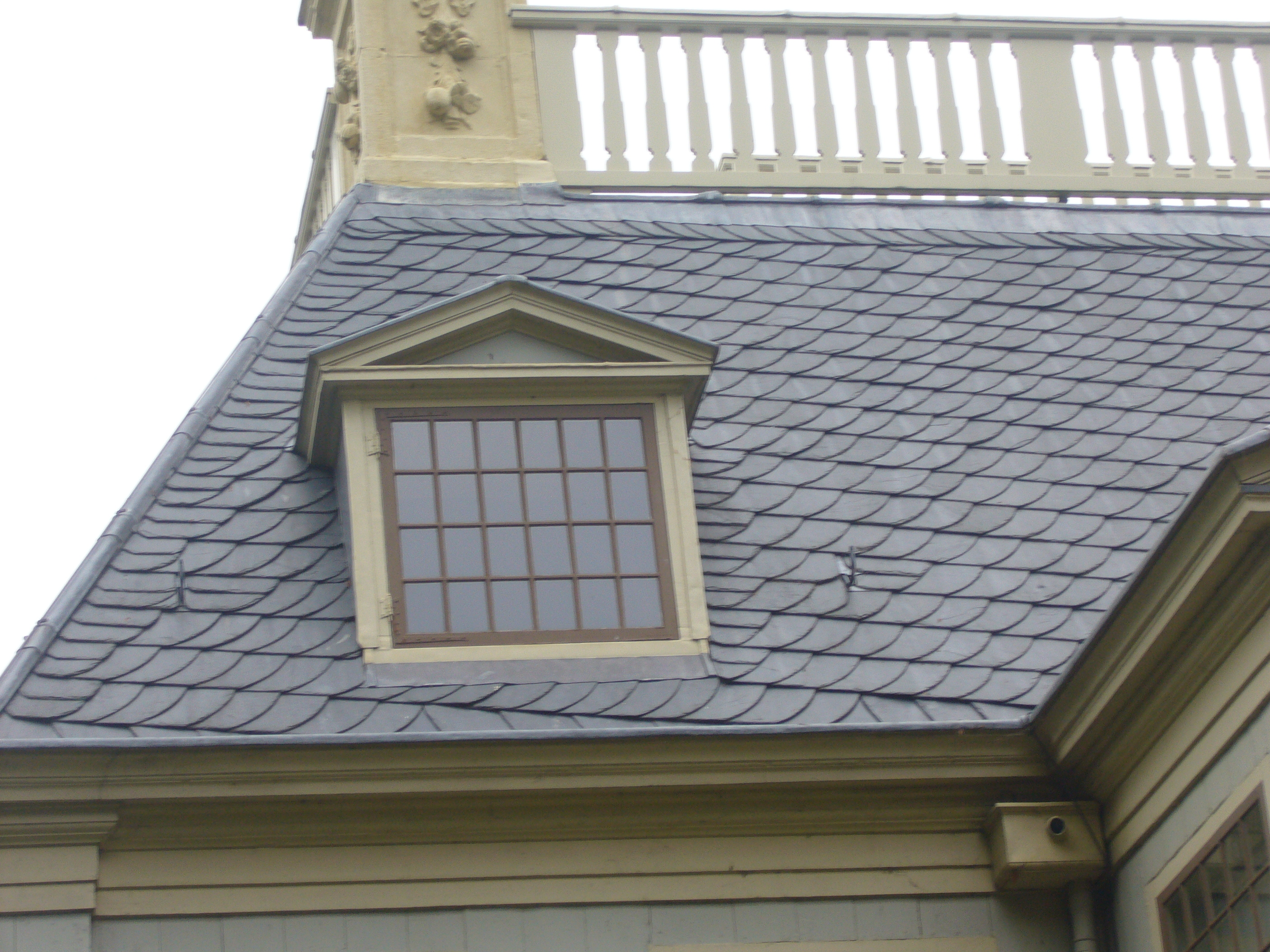 Trompenburg, 's- Graveland, leien dak. De leien op het dak zijn in een opvallend scheef patroon gelegd.